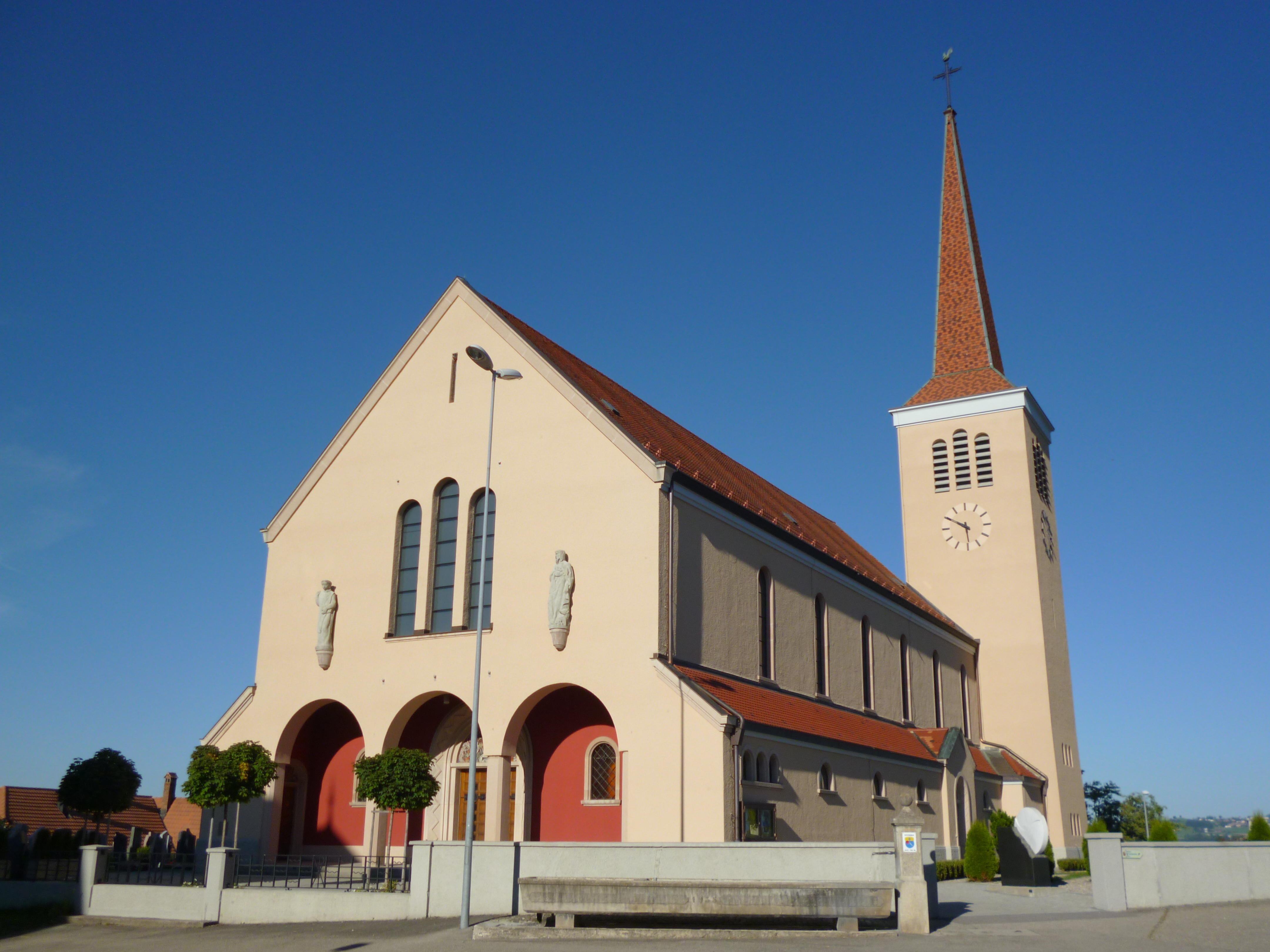 Eglise d'Ependes, Canton de Fribourg, Suisse